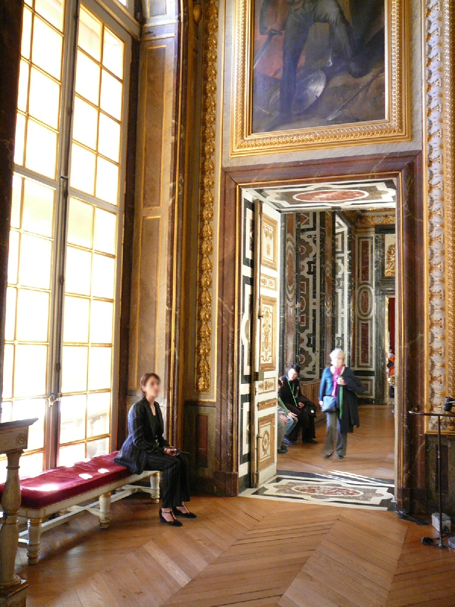 Suite dans le Grand Appartement de la Reine. /Grand Appartement de la Reine en suite. Château de Versailles, Yvelines, Ile de France, France.